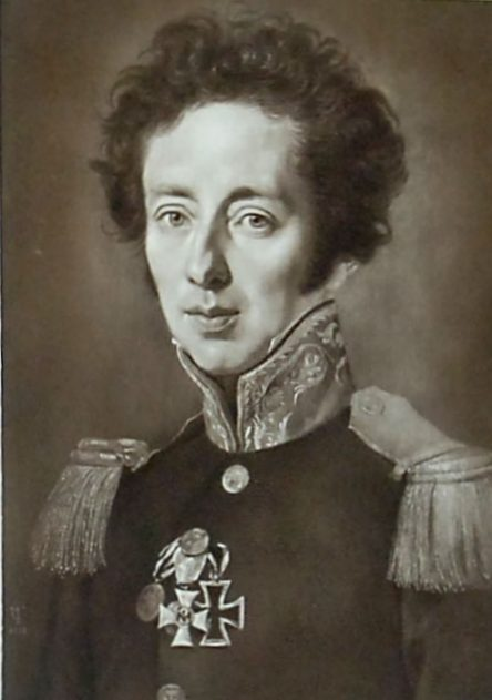 Eberhard von Hymmen (* 1784; † 1854), erster Landrat des Kreises Siegburg von 1821 bis 1854